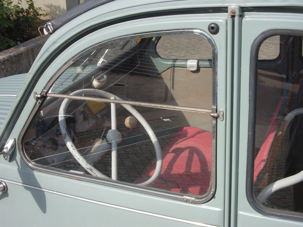 Citroën 2 CV, Baujahr 1957 (laut Beschriftung), in Kerkrade